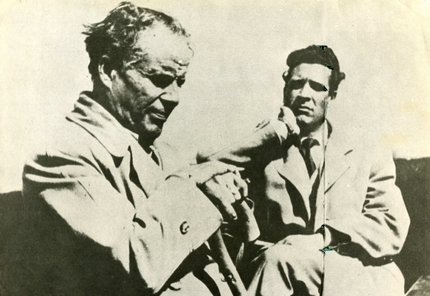 صورة الحبيب بورقيبة عند نقله من المنفى بجزيرة جالطة (لاجاليت) غير المأهولة قرب ساحل تونس الشمالي حيث نفته فرنسا عام ١٩٥٢ مدة عامين .